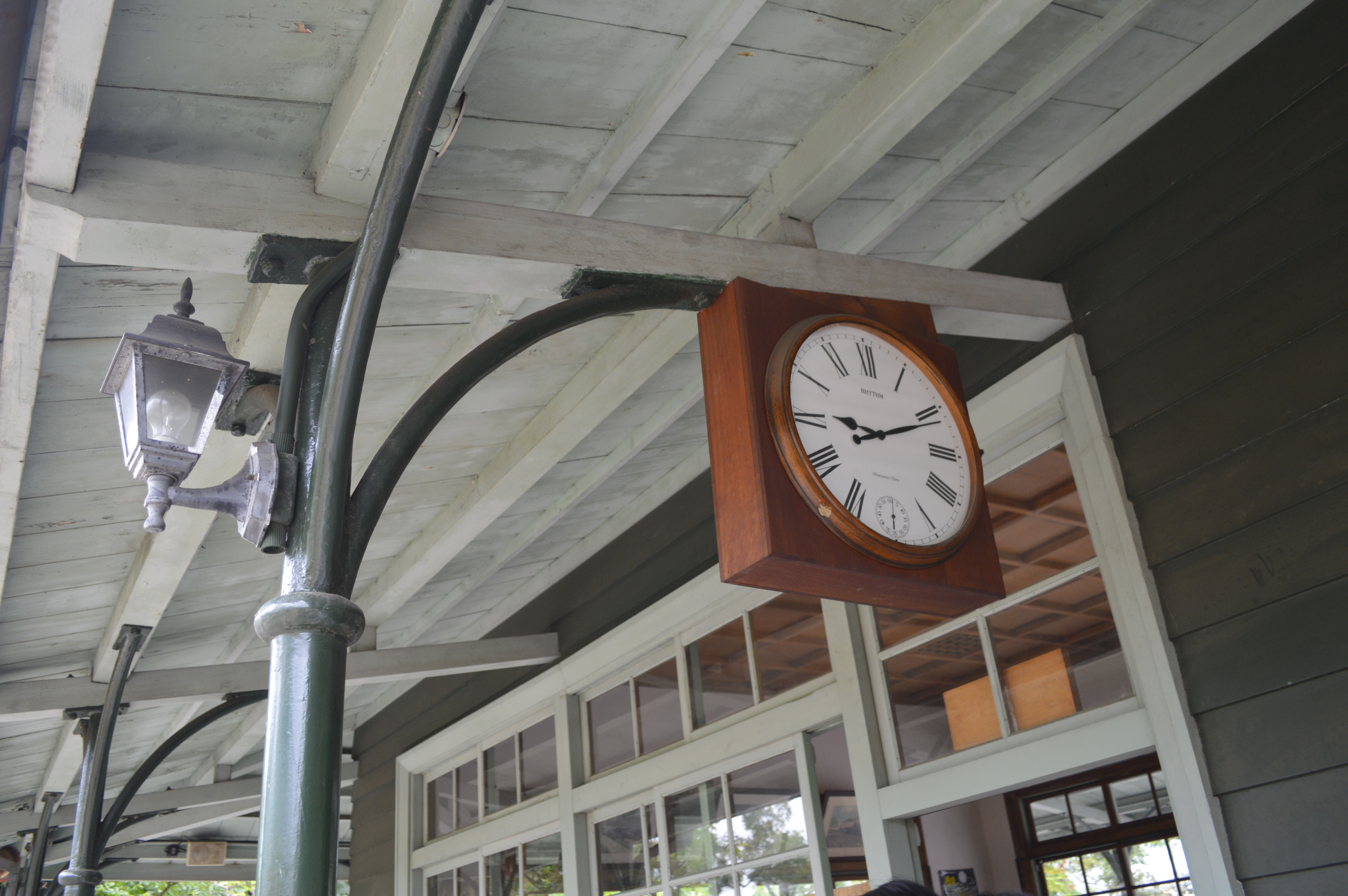 中文（台灣）: 嘉義市阿里山森鐵北門站的時鐘